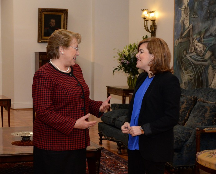 Michelle Bachelet, se reunió, en el marco de una visita oficial, con la vicepresidente de España, Soraya Sáenz, en el Salón de Audiencias del Palacio de La Moneda.